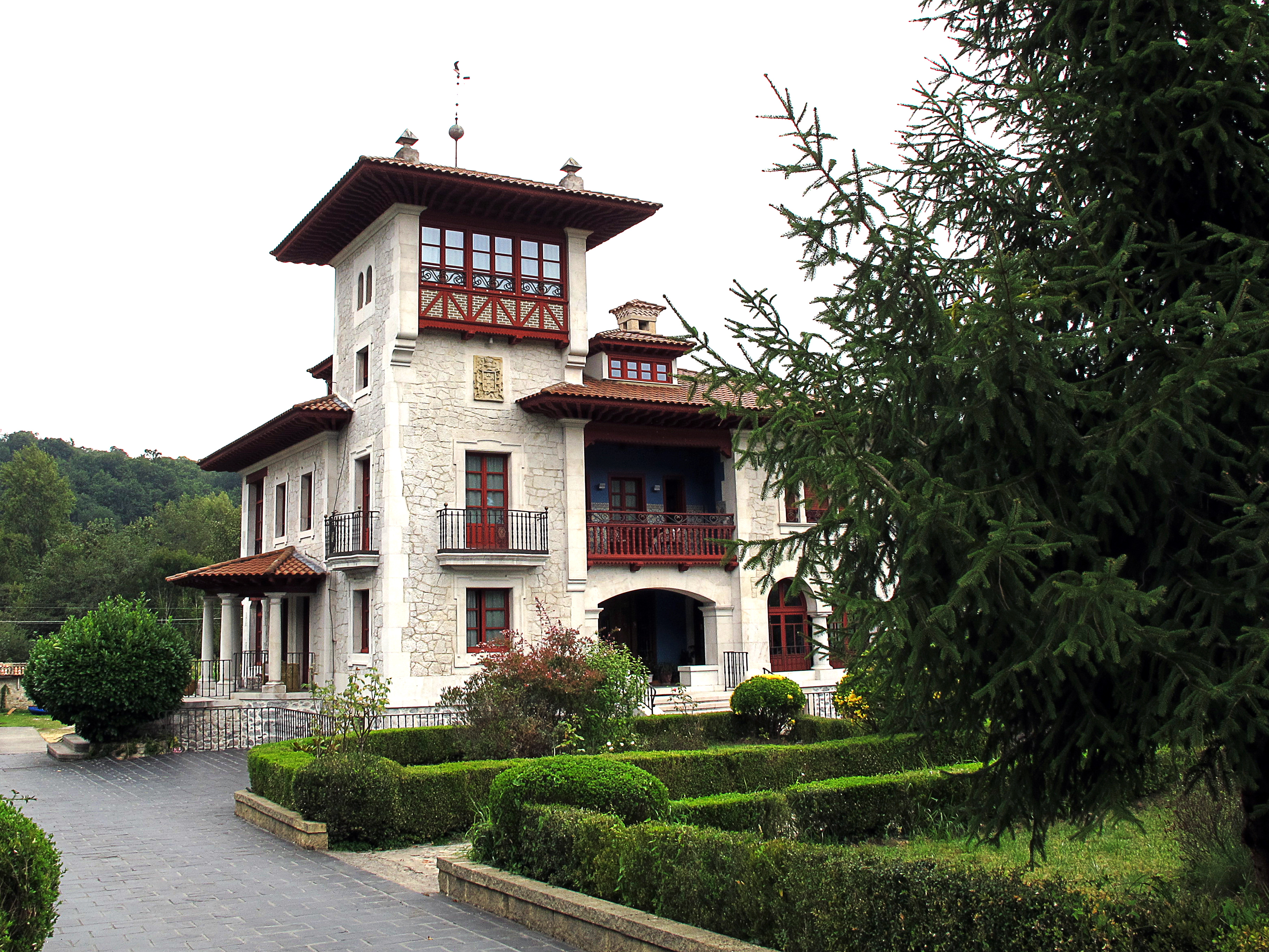 Hotel Palacete Real. Fromer Villa Joaquina. Built in 1922 by Manuel del Busto in estilo montañés.